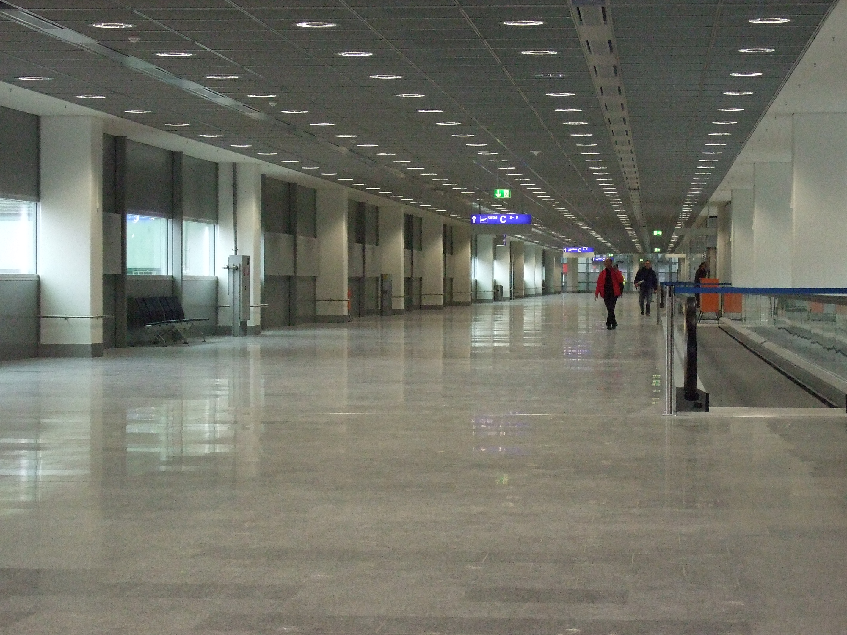 Teil des sogenannten C/D-Riegels am Frankfurter Flughafen. In einer weiteren Ausbaustufe wird die linke Wand durch weitere Abfluggates ersetzt.